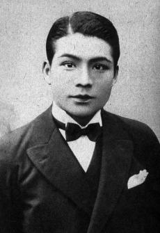 星ひかる、1920年代の写真